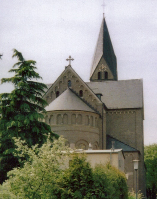 Köln-Niehl,_Katholische_Kirche.jpg